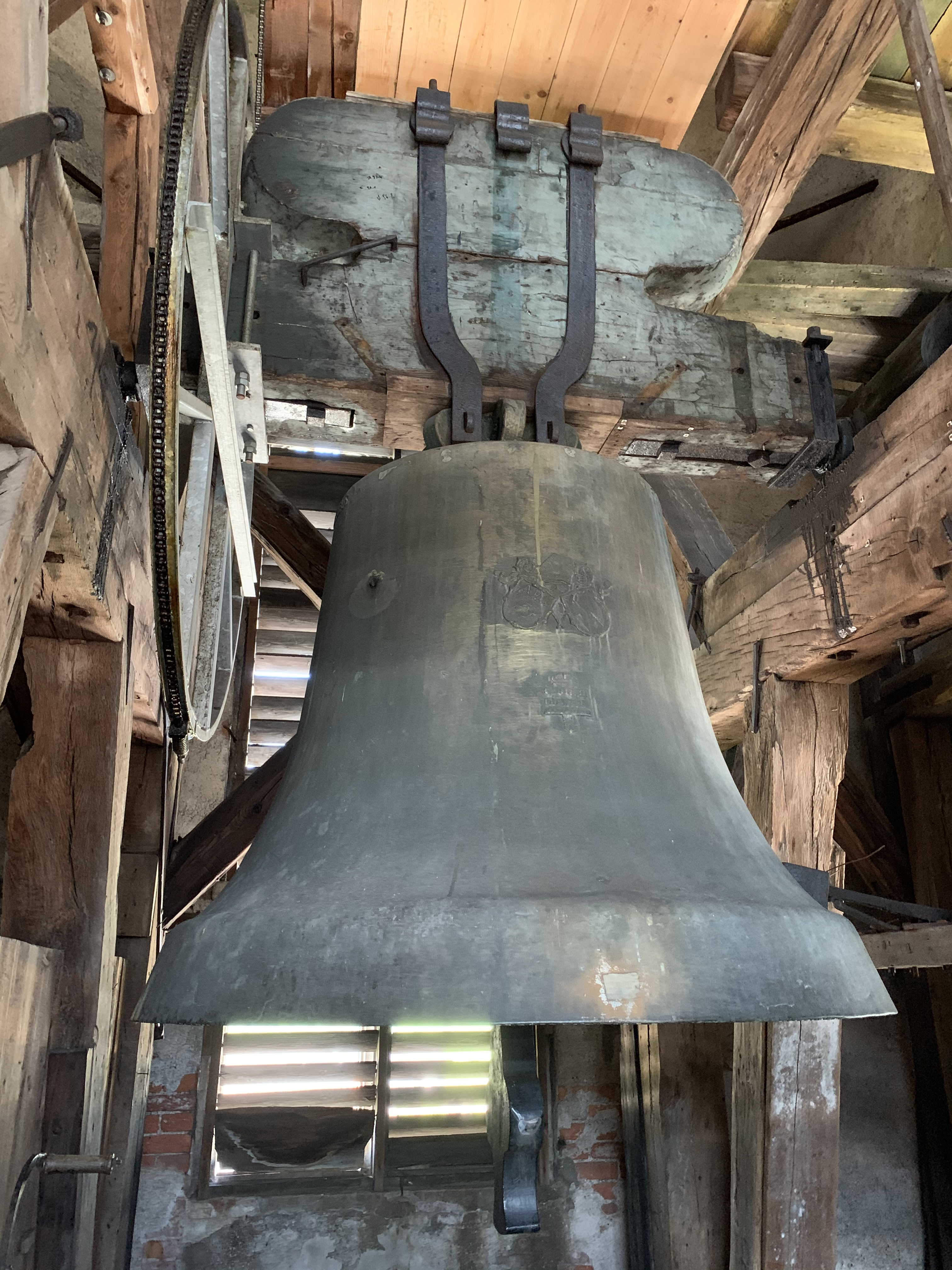 Glocke „Blaserin“ der Stiftskirche Admont